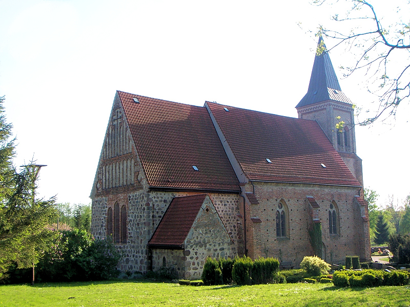 Kirche in Kessin, Landkreis Bad Doberan